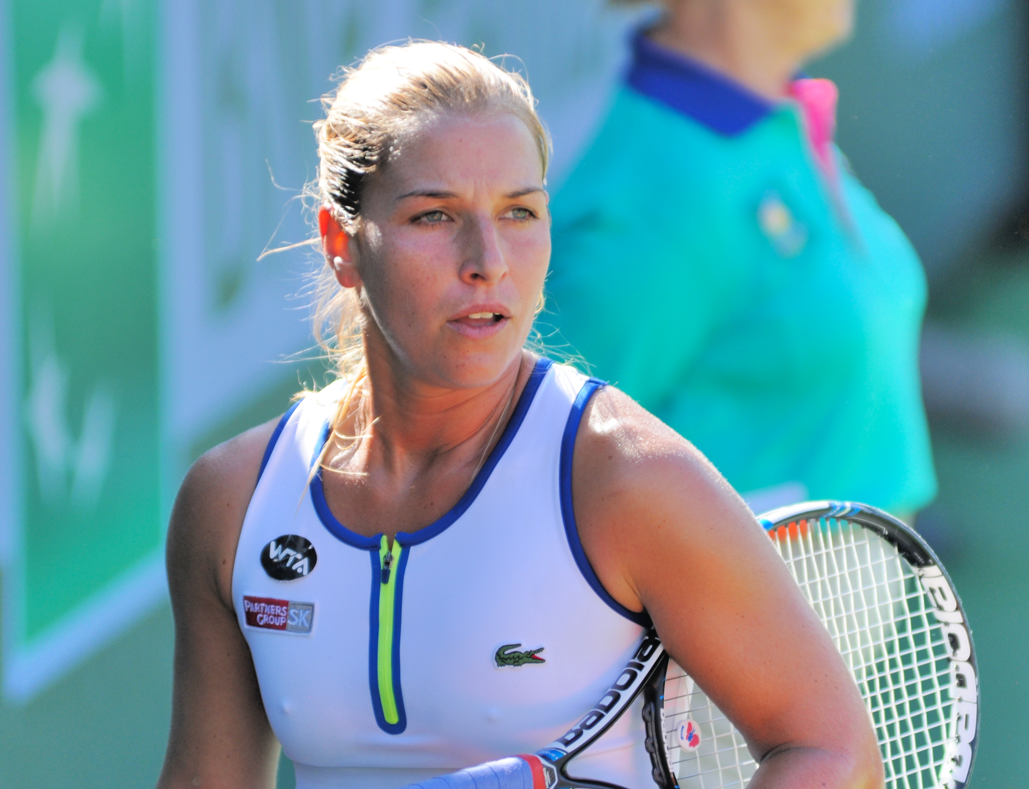 BNP Paribas Open 2016